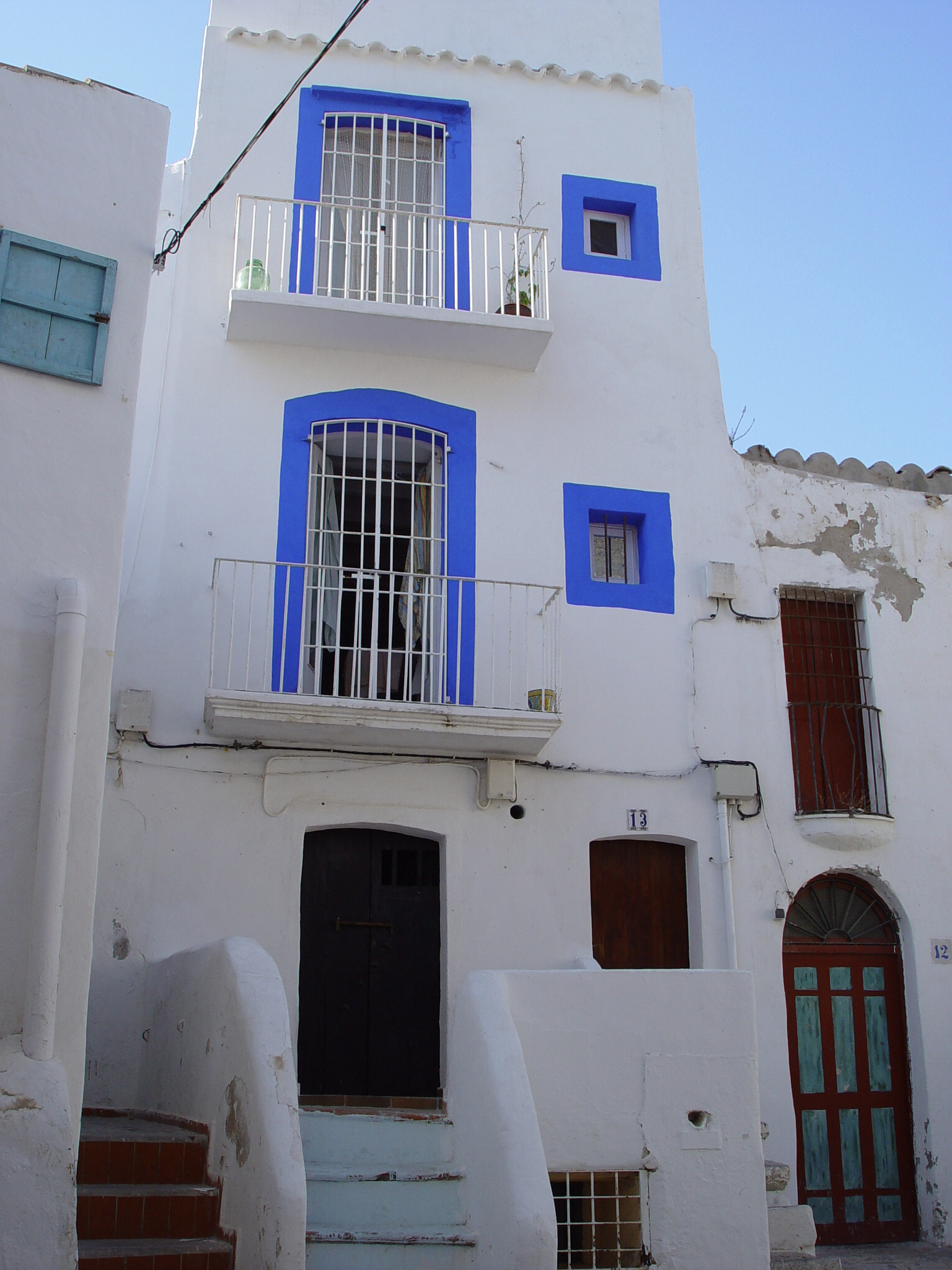 Arquitectura Ibicenca, Ibiza